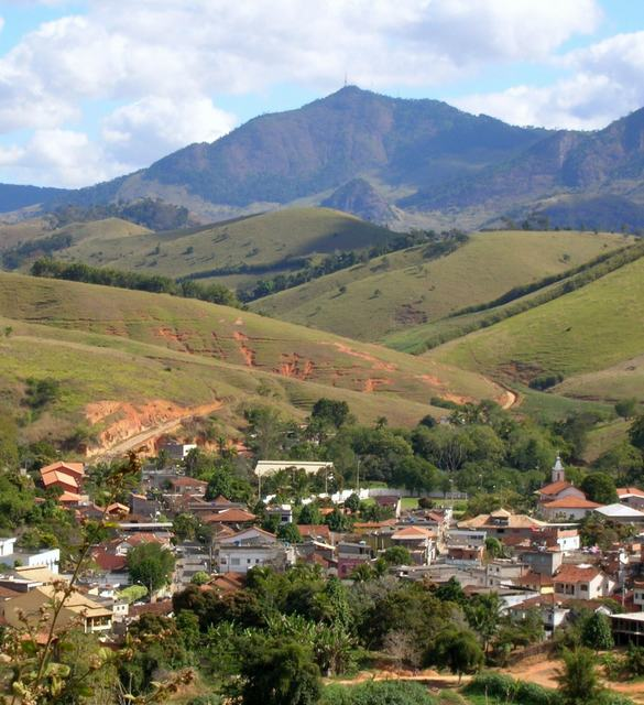 São josé de Ubá vista do morro do Loteamento Nova Ubá